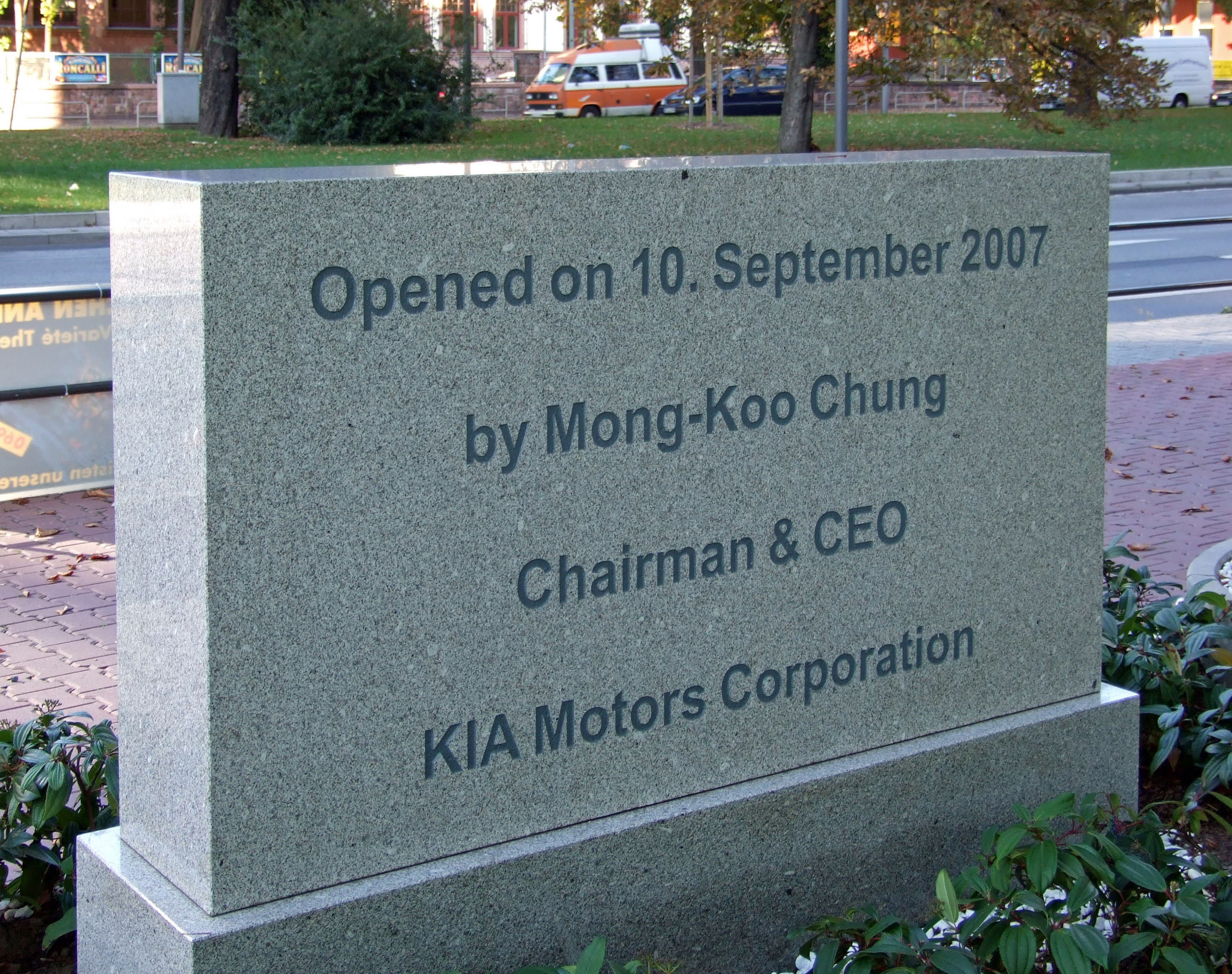 Zentrale von KIA Motors Europe, in Ffm, Theodor-Heuss-Allee, neben dem Messegelände